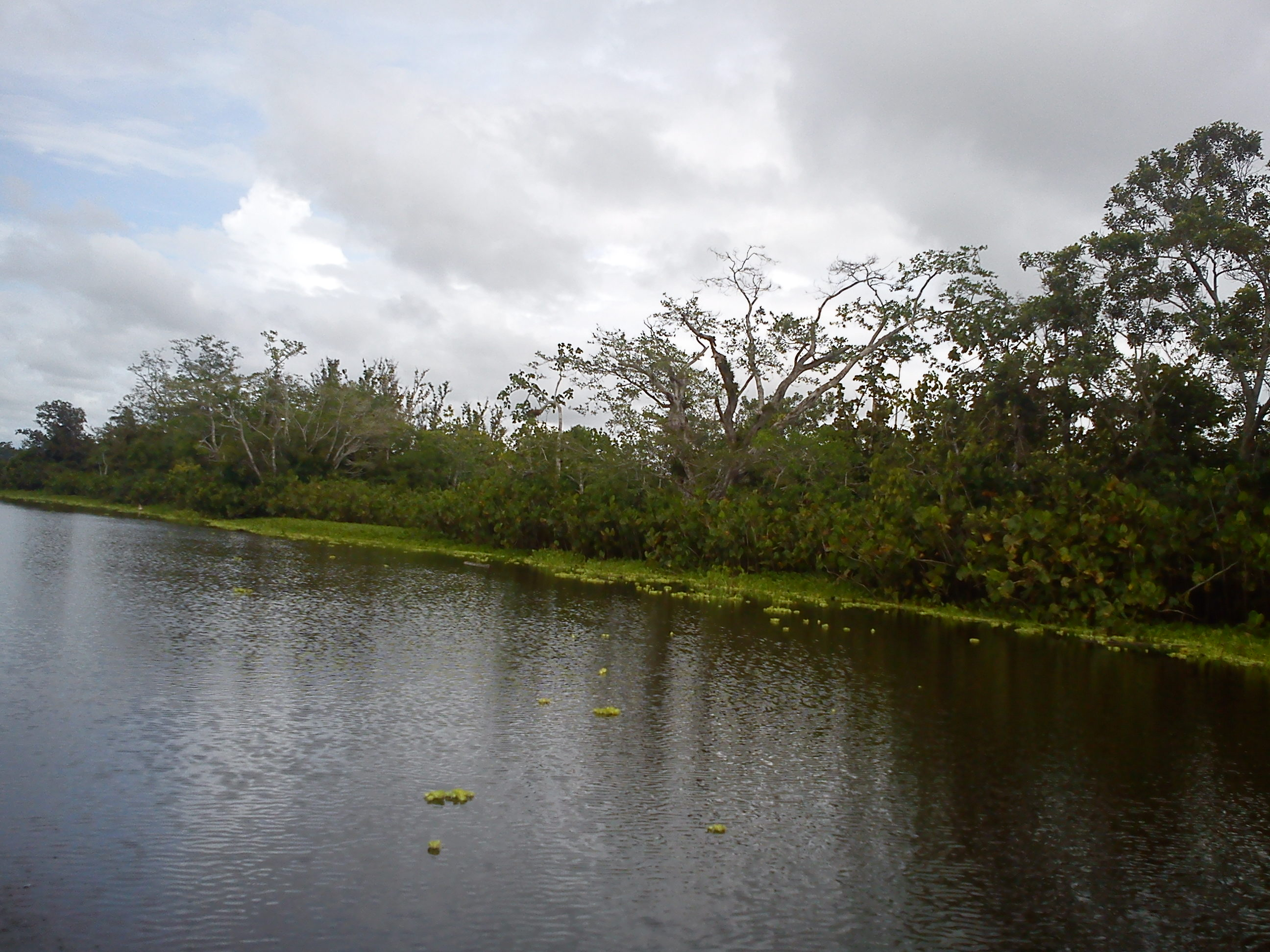 Entrando por el Cacaricas